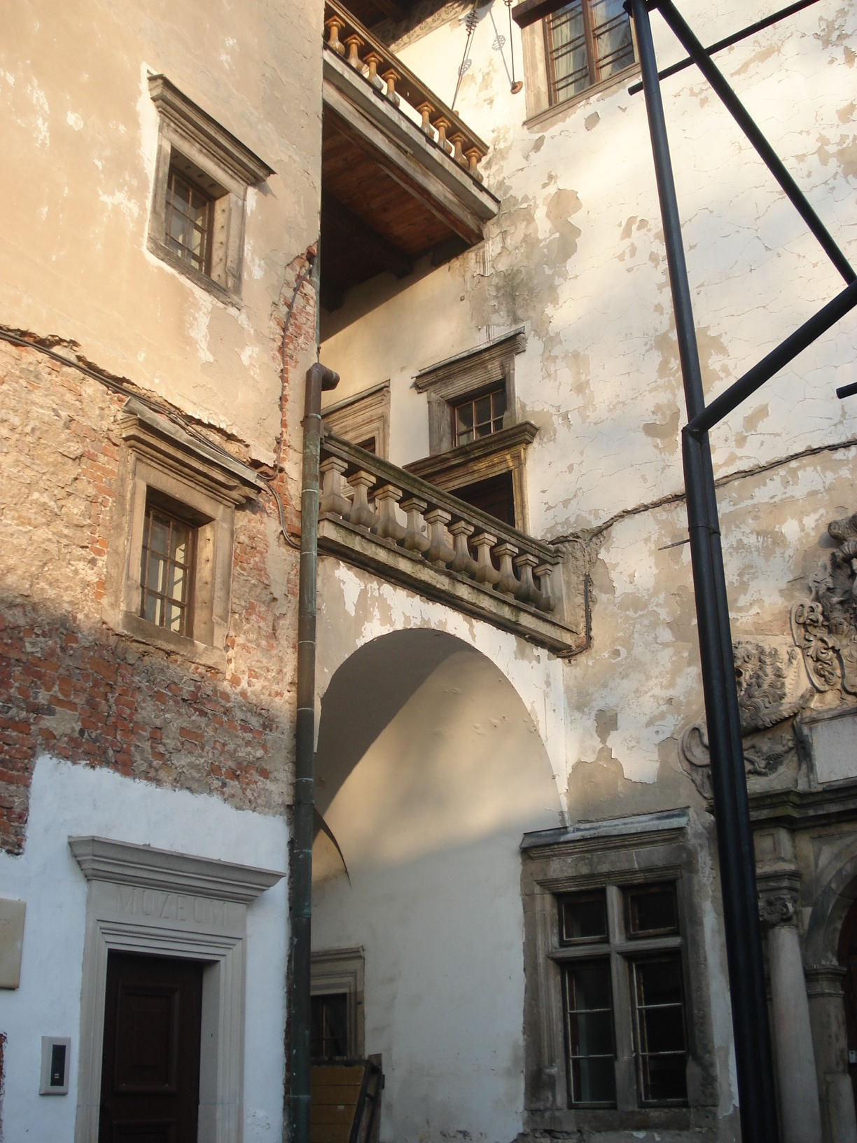 Loggia na zamku w Szydłowcu